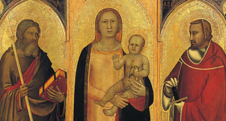 Maso_di_Banco_Polyptych_from_Santo_Spirito,_detal_c._1340